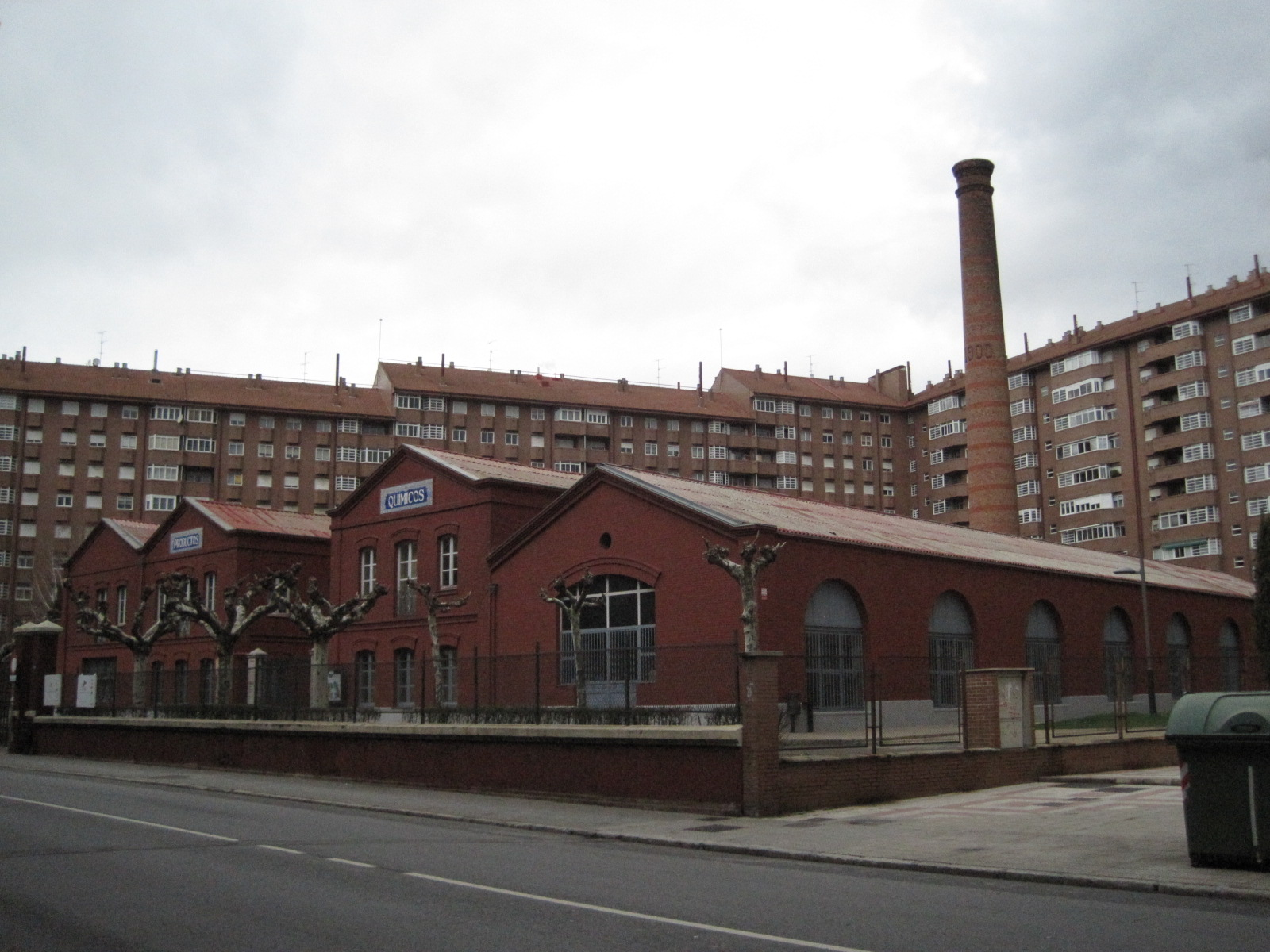 Fabrica Abelló, en León (España).